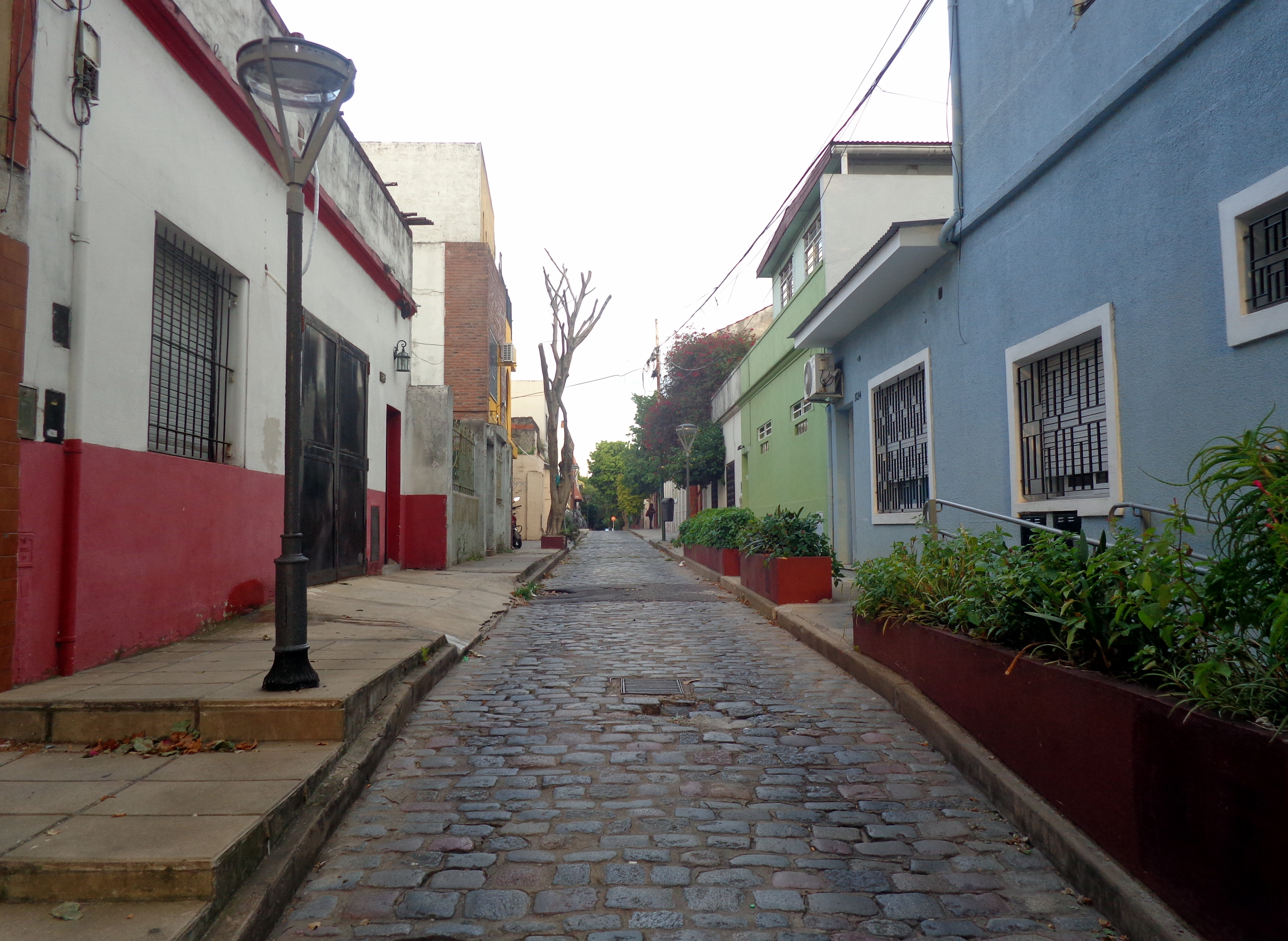 Pasaje Julio San Dantas.